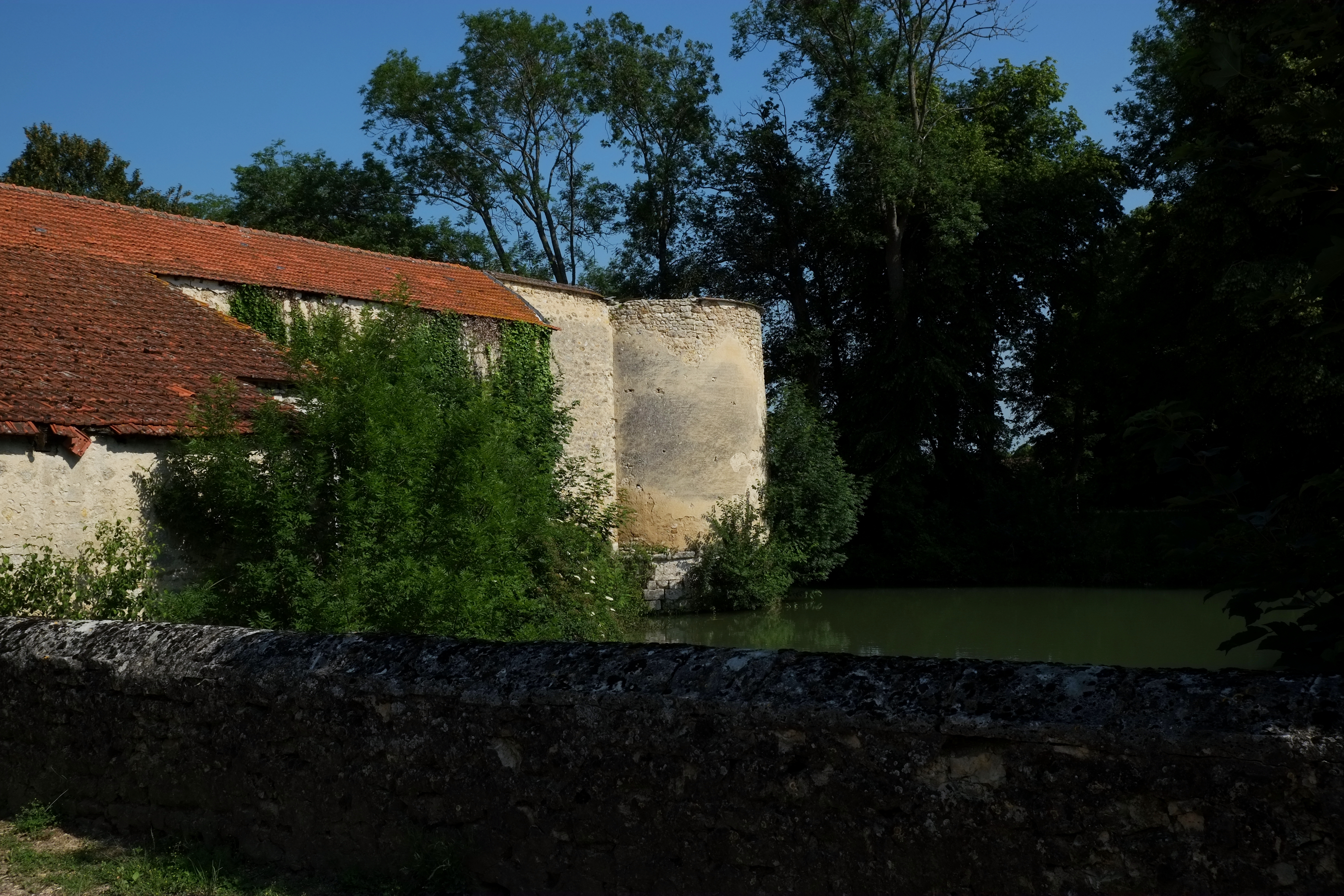 Ehemaliges Schloss in Beaumont-du-Gâtinais (Frankreich)